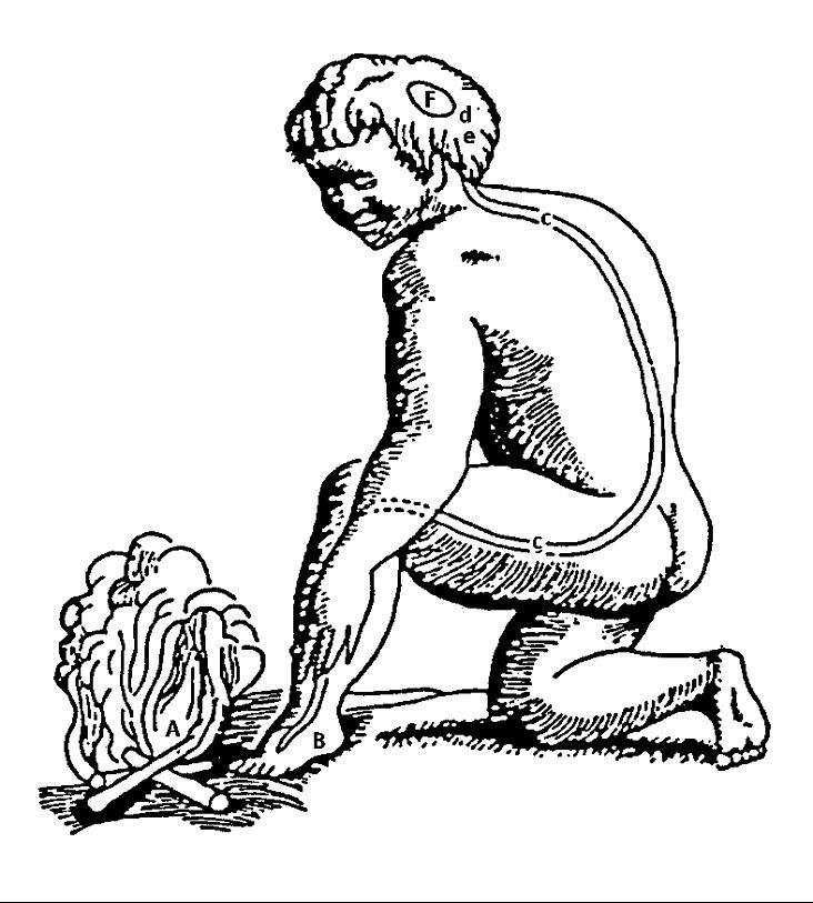 Beschreibung: Illustration von René Descartes: Ein Reiz wird - hier durch Verbrennung - aufgenommen und zum Gehirn weitergeleitet. Dort interagiert es mit dem immateriellen Geist. Quelle: René Descartes: ?